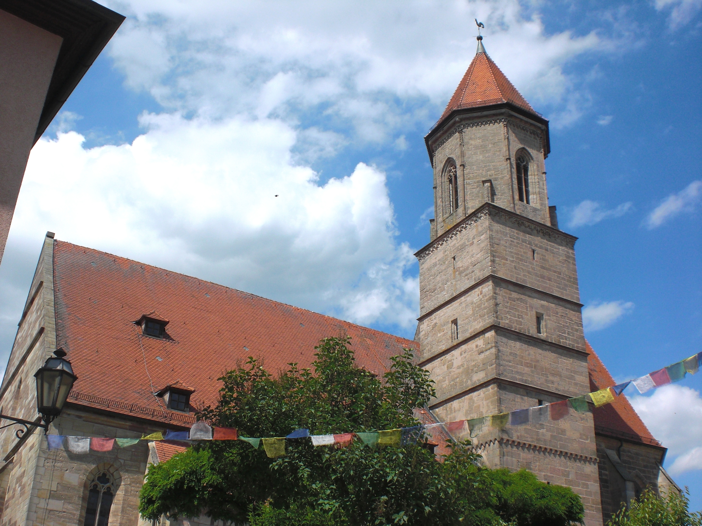 Evangelische Stadtkirche St. Maria in Gunzenhausen